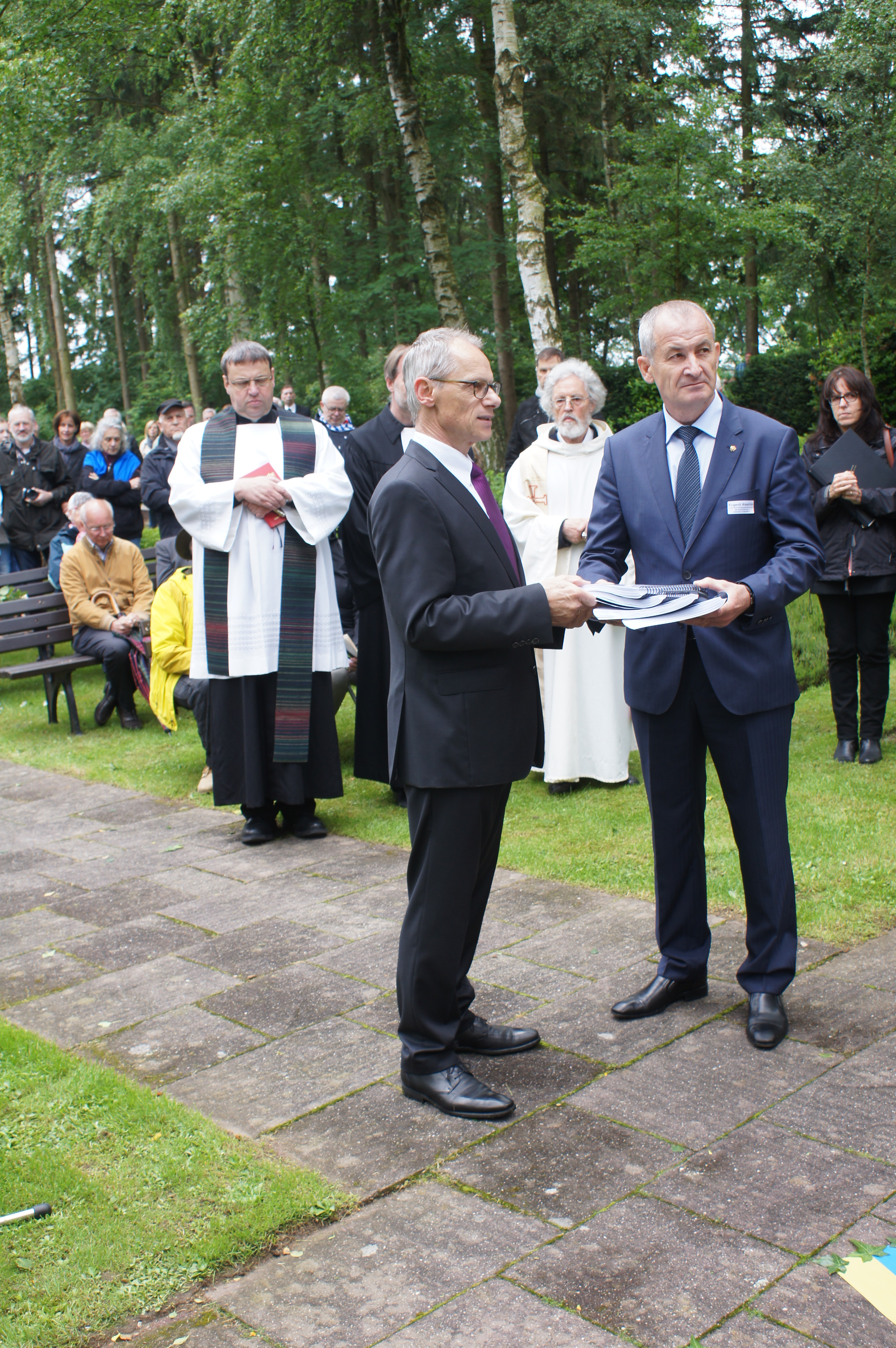 Granitstelen Russengräber Kesternich Rurberg Einweihung